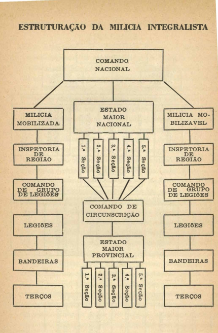 Página do livro "O que o Integralista deve saber" que é explicado toda a estruturação da milicia integralista